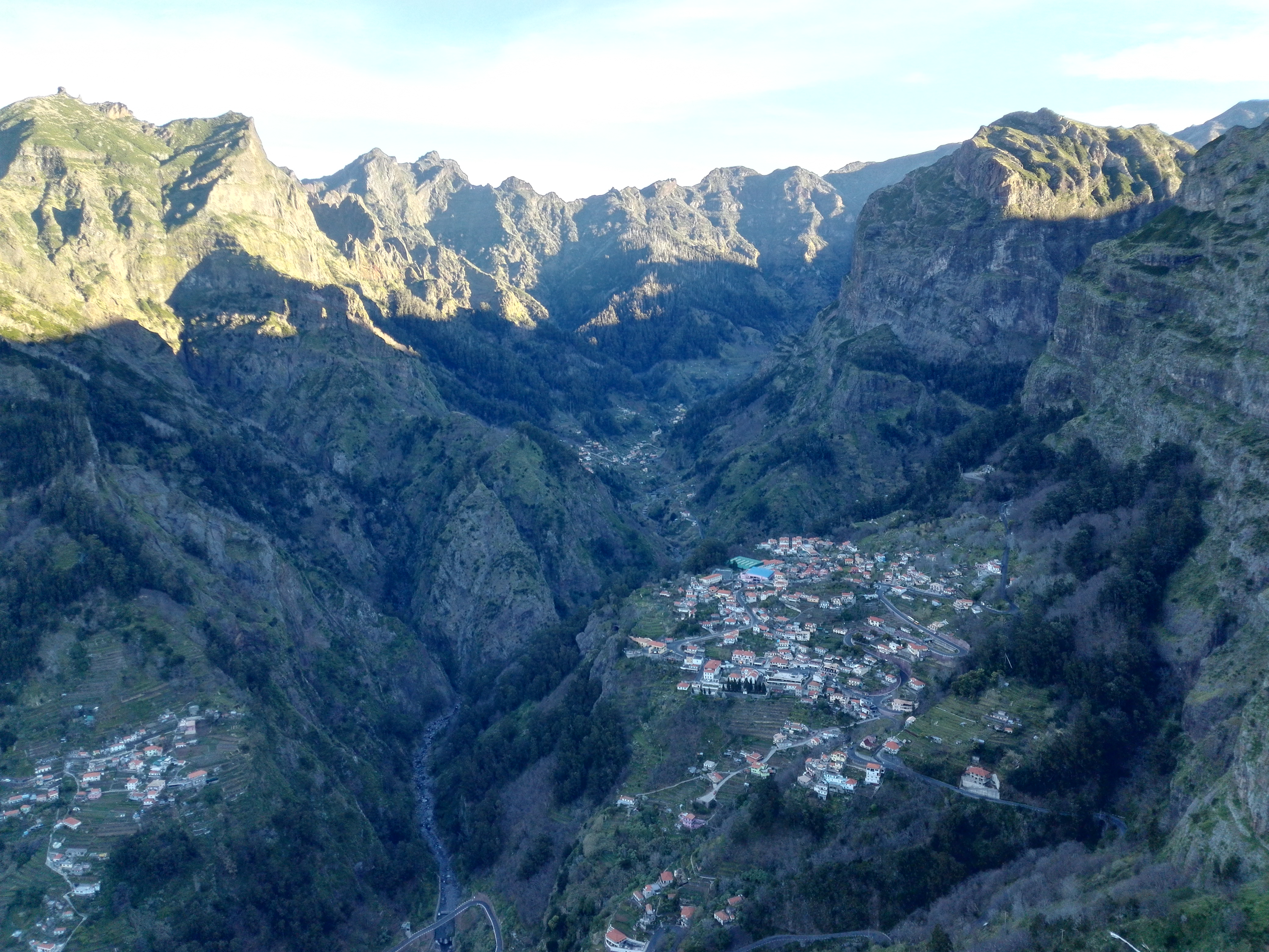 Curral das Freiras, März 2017. Aufnahme von Aussichtspunkt beim Hotel Estalagem Eiro do serrado